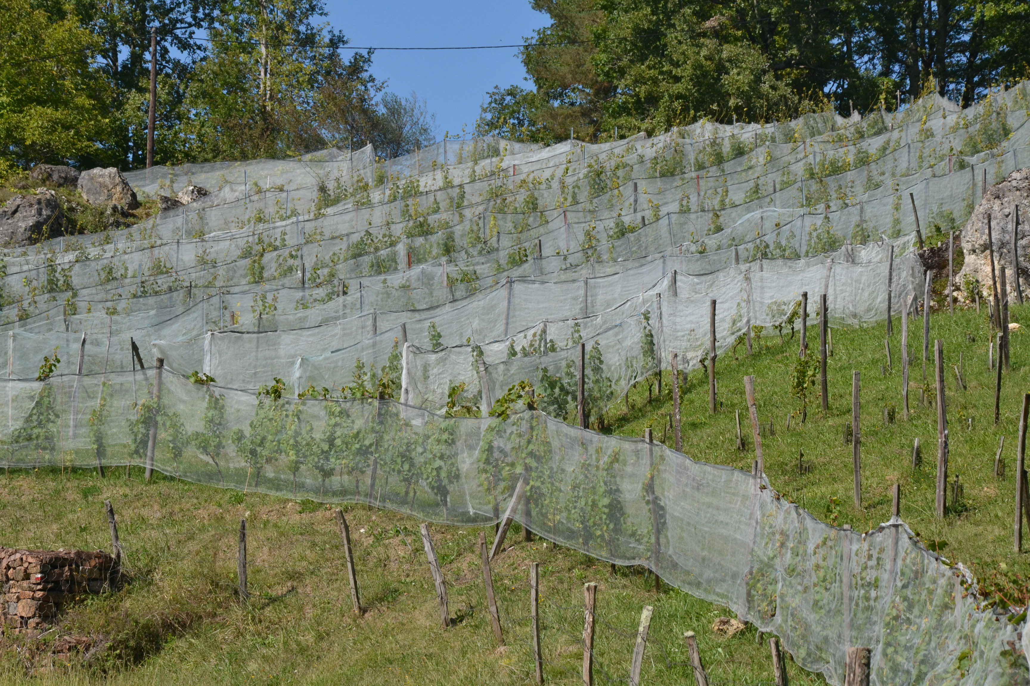 Vignes au Soulier, Chasteaux (Corrèze, France)